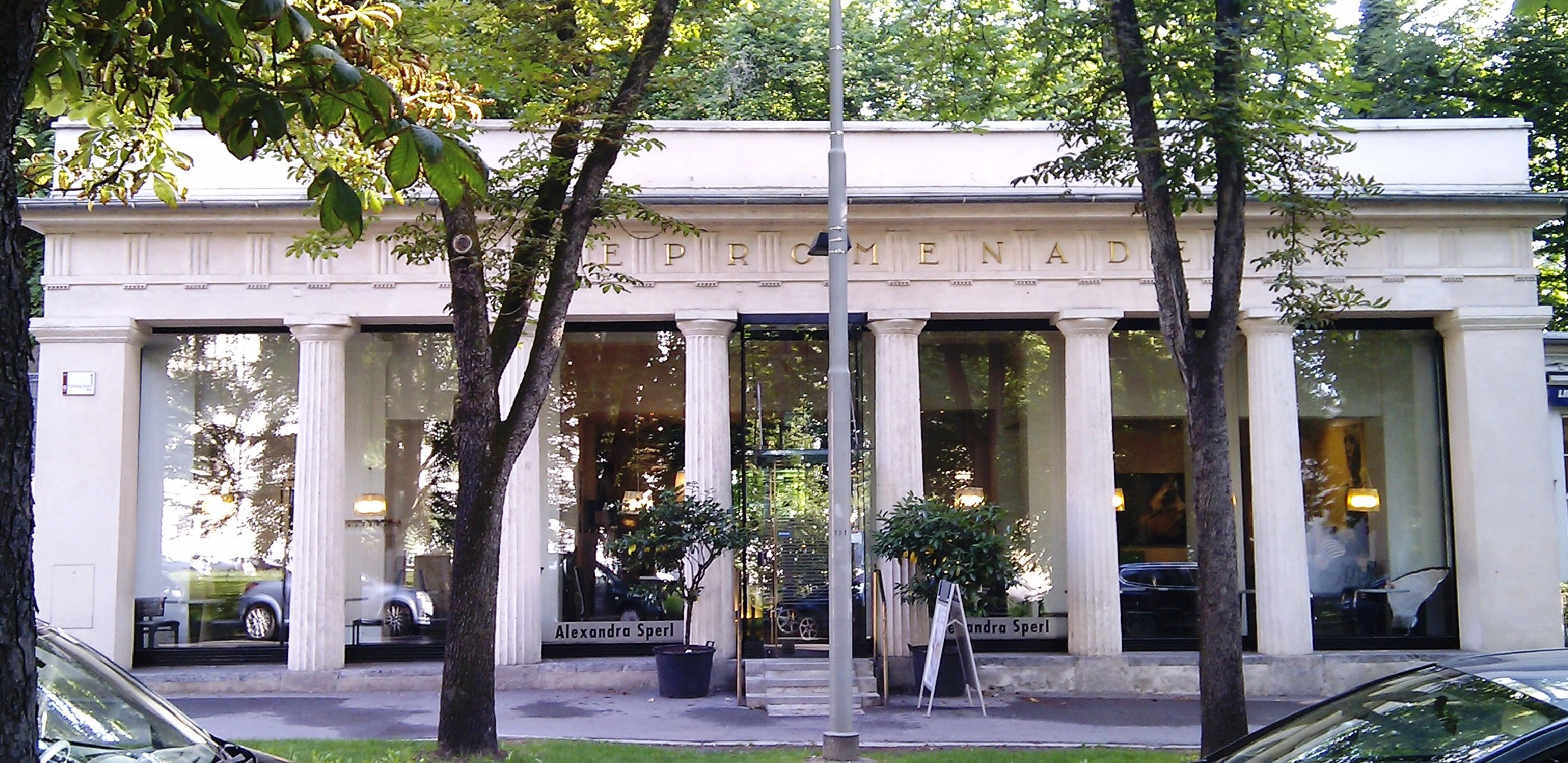 Café Promenade, Ehem. Torwachhaus, Erzherzog-Johann-Allee 1, Graz